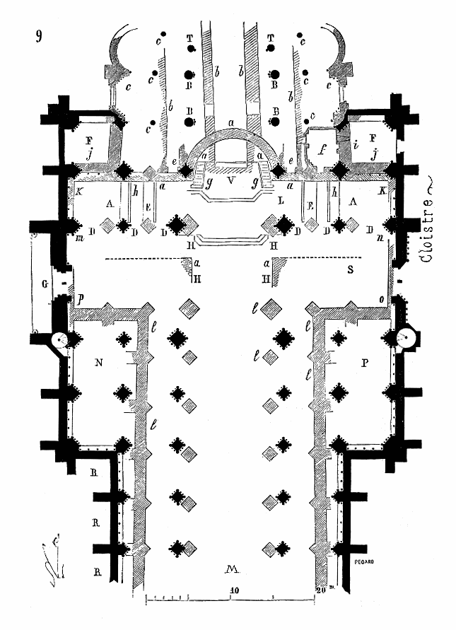 ... Or, les plans successifs de l'église de Saint-Denis nous font, pour ainsi dire, toucher du doigt cette modification dans les habitudes religieuses des grandes abbayes. Ils méritent donc une étude attentive. Voici (fig. 9) ces plans présentés les uns sur les autres et tels que les fouilles et les traces de constructions encore existantes ont pu les faire reconnaître. On voit en a les restes des soubassements de l'abside et du transsept de l'église de Dagobert, bâtie avec des débris de monuments gallo-romains. Pendant la période carlovingienne, l'église fut très-allongée en b au delà de l'abside de Dagobert; puis viennent s'implanter les constructions de Suger, encore visibles au-dessus du sol en c. Alors les deux descentes aux cryptes plus anciennes furent ménagées en e; le sanctuaire se développa largement au-dessus des caveaux de l'église carlovingienne, et l'on dut y monter par des degrés établis en g, des deux côtés de l'autel, et en h ...